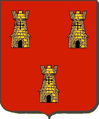 Armoiries des comtes de Saintignon.